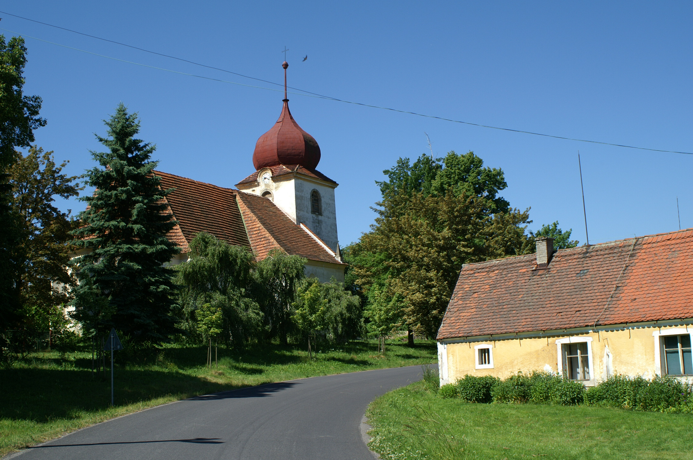 Náves v Rousínově u Rakovníka.